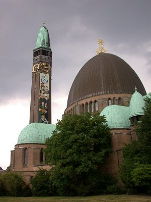 Zelf gemaakt, toestemming voor gebruik op Wikipedia Categorie:Afbeelding Waalwijk